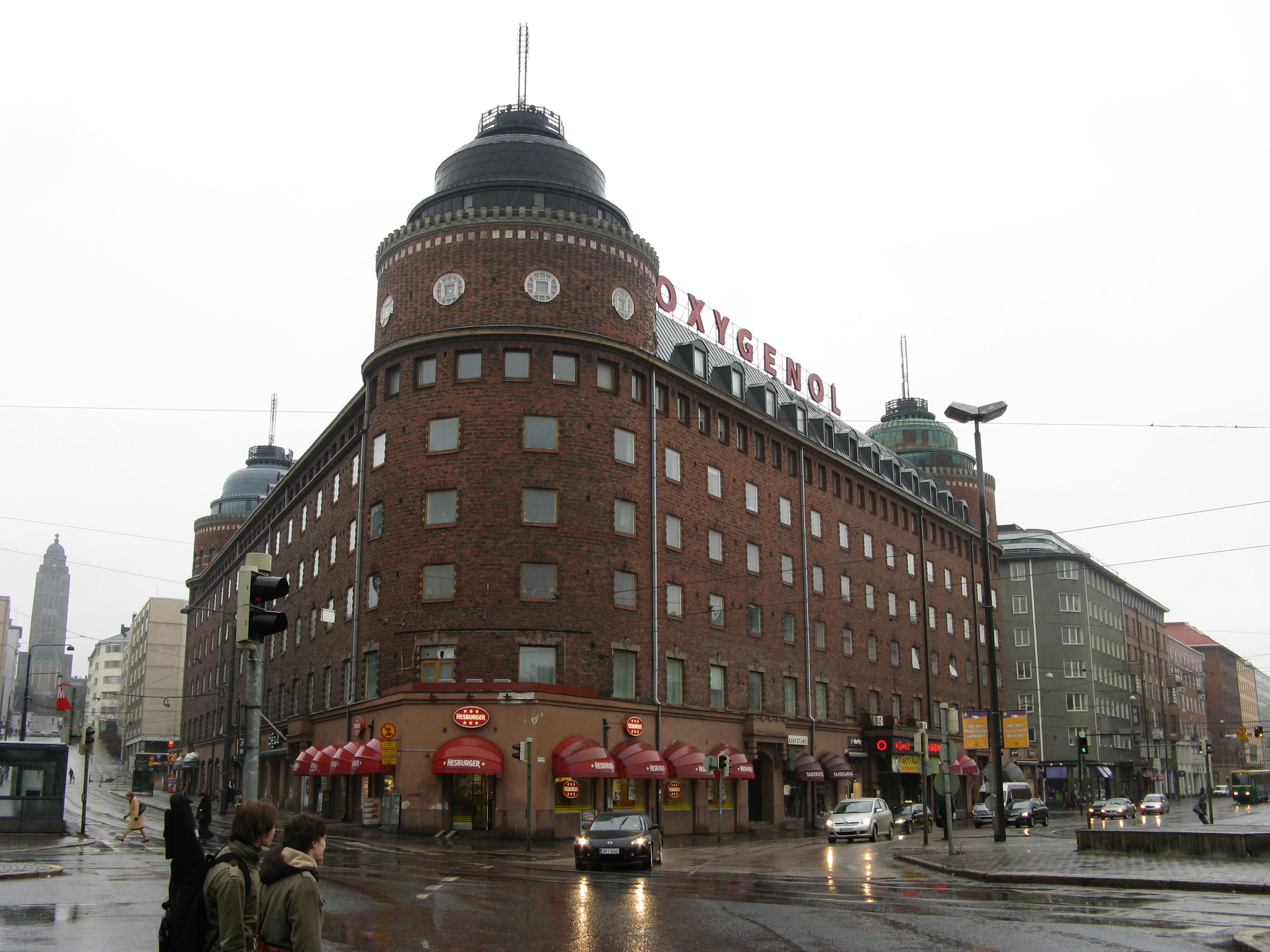 Hakaniemen halli